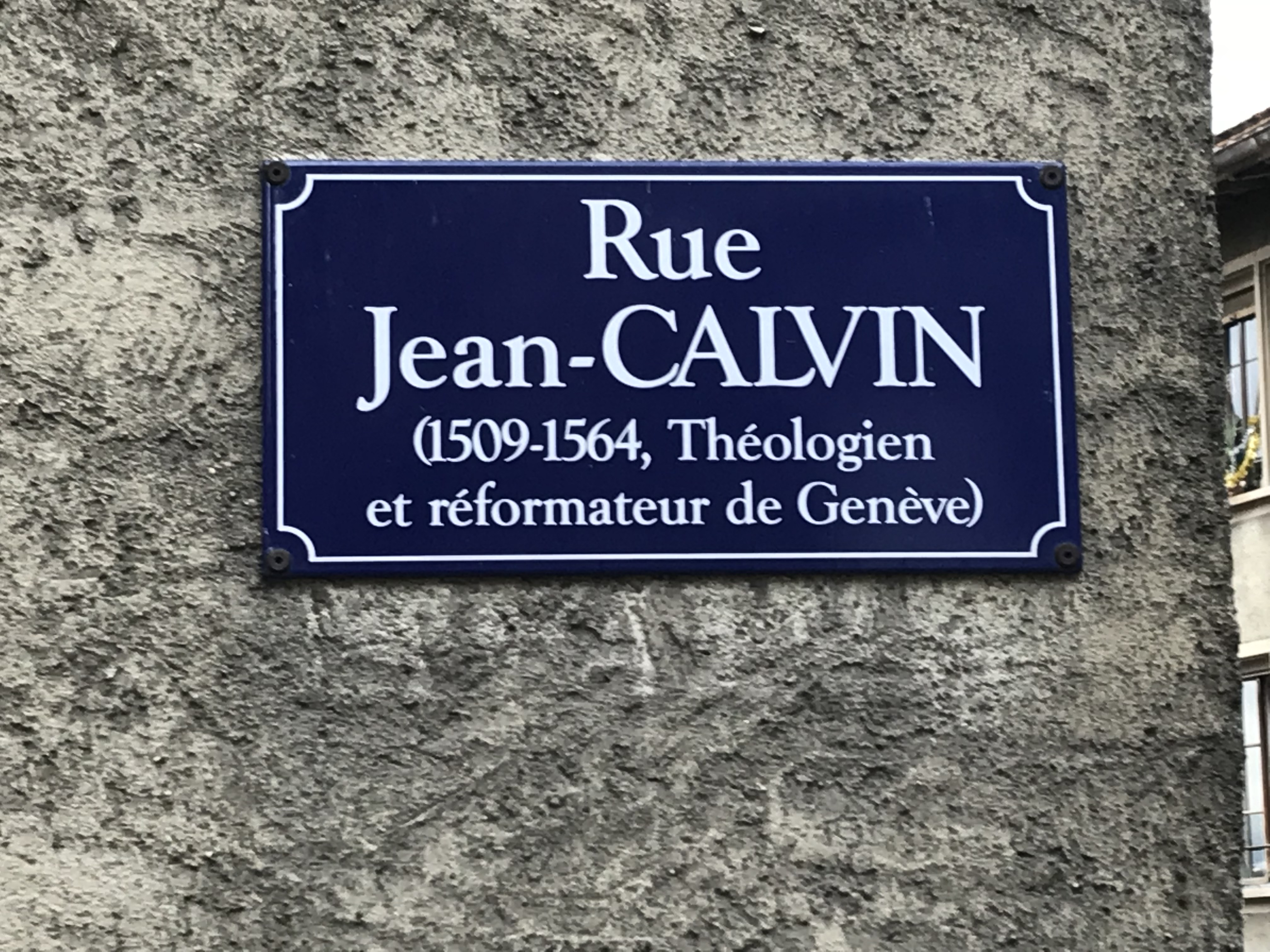 L'une des plaques de rue de la rue Jean-Calvin à Genève, le 20 décembre 2018.